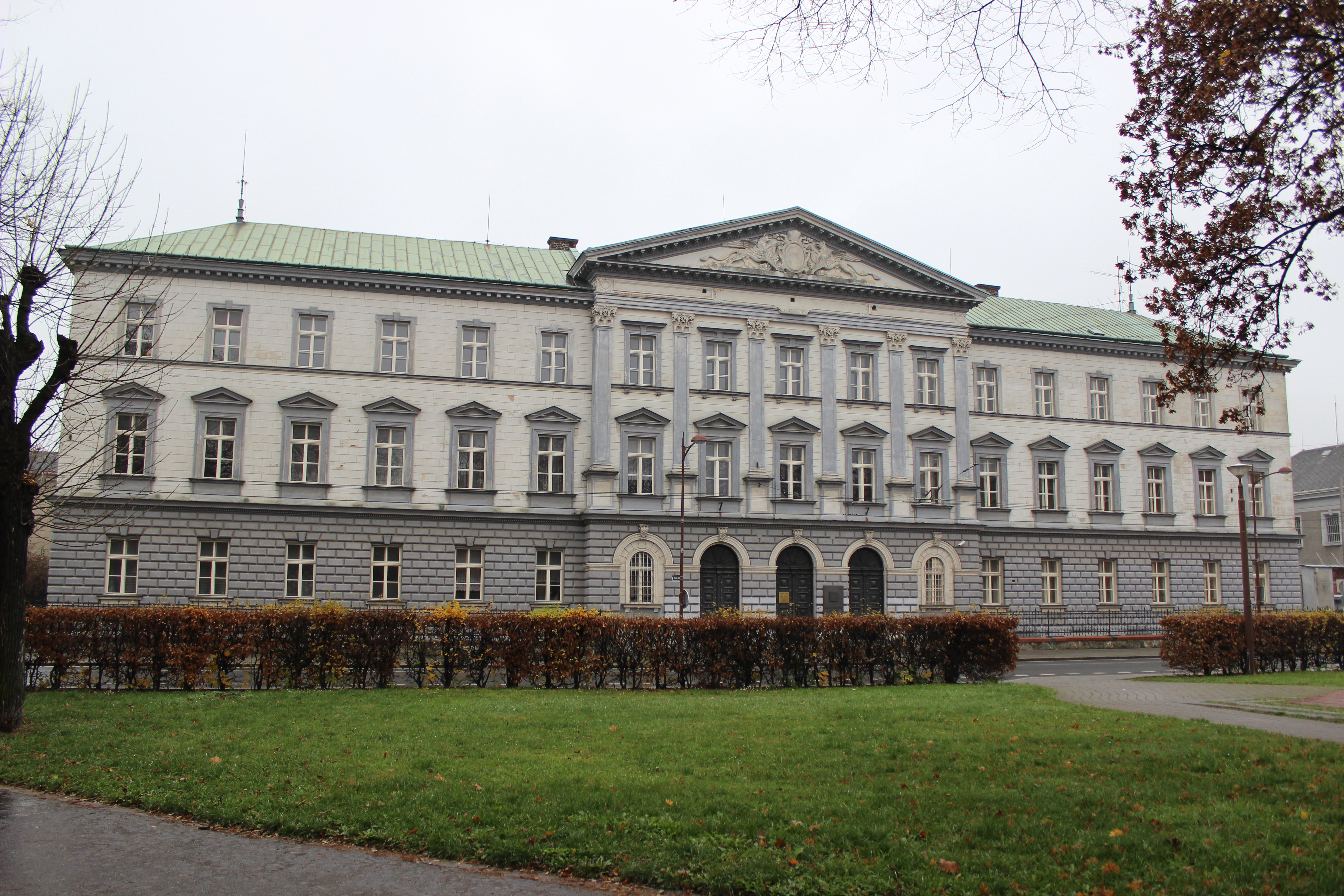 Budova okresního soudu v Opavě (severozápadní průčelí).